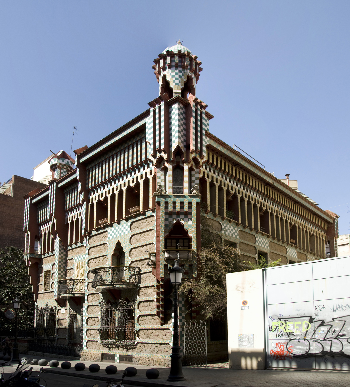 Casa Vicens (Barcelona)